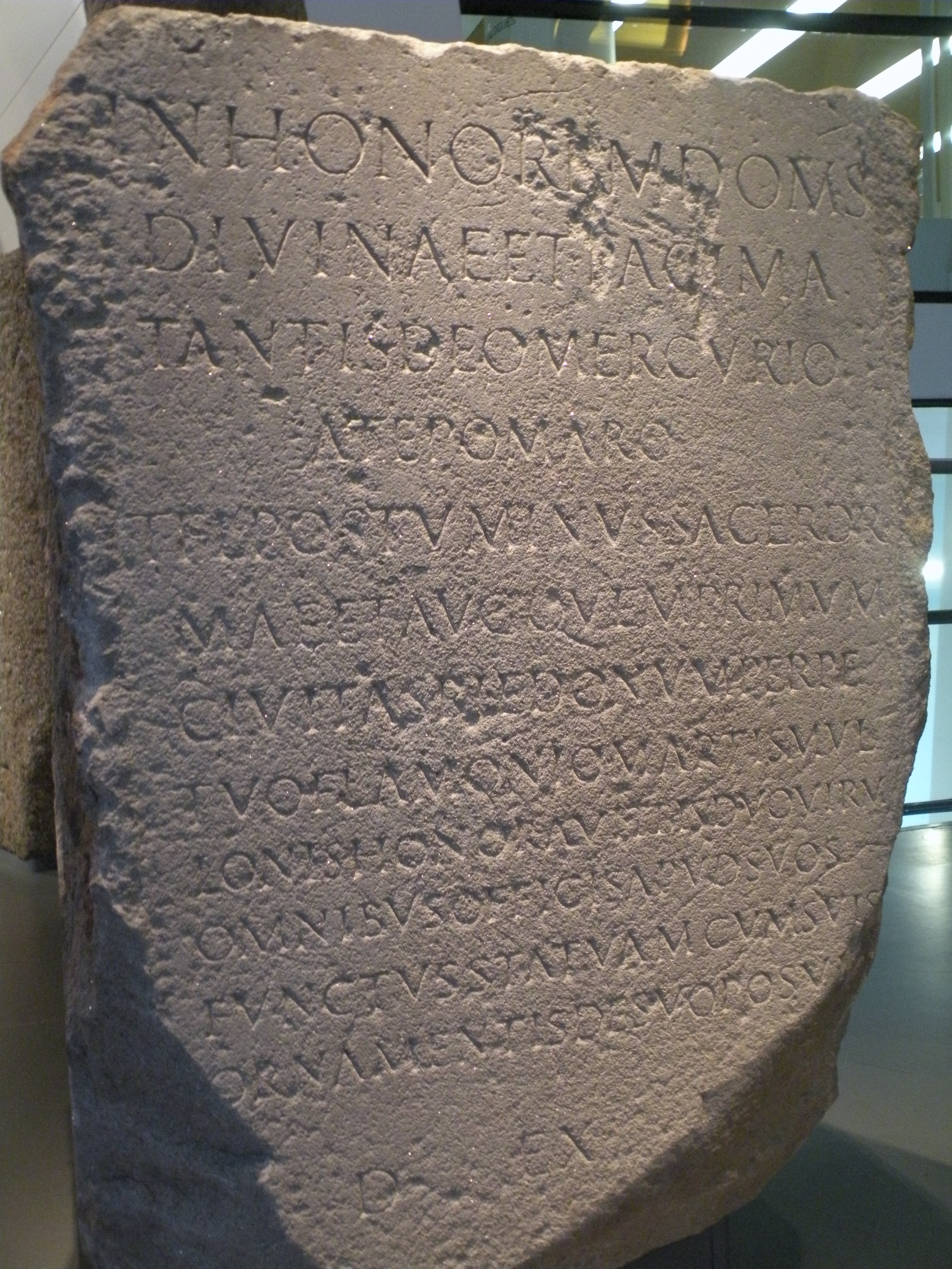 Base avec inscription dédiée à Mercure Atepomaros par Titus Flavius Postuminus.